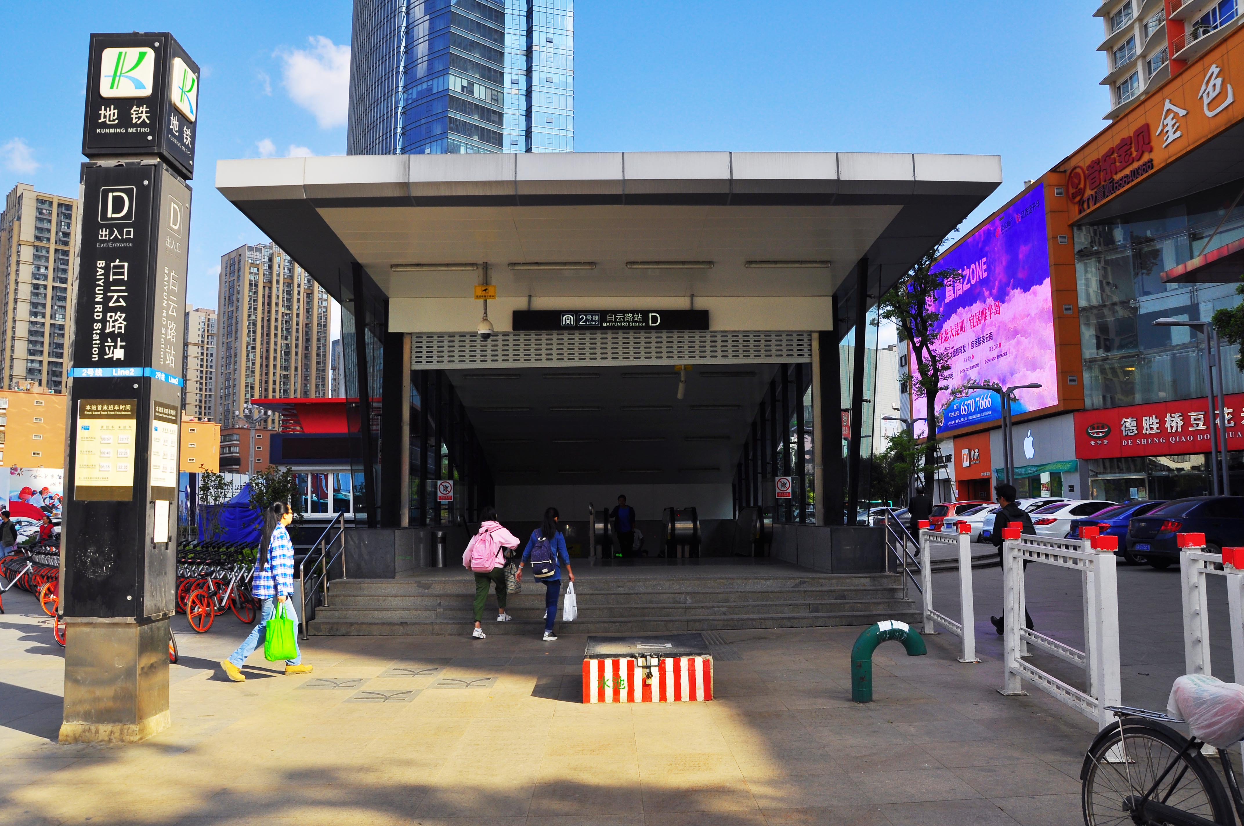 昆明地铁2号线白云路站。